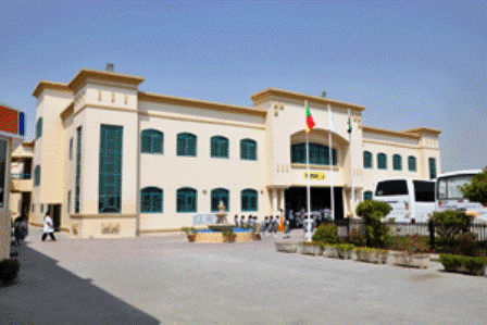 Sharjah Indian School